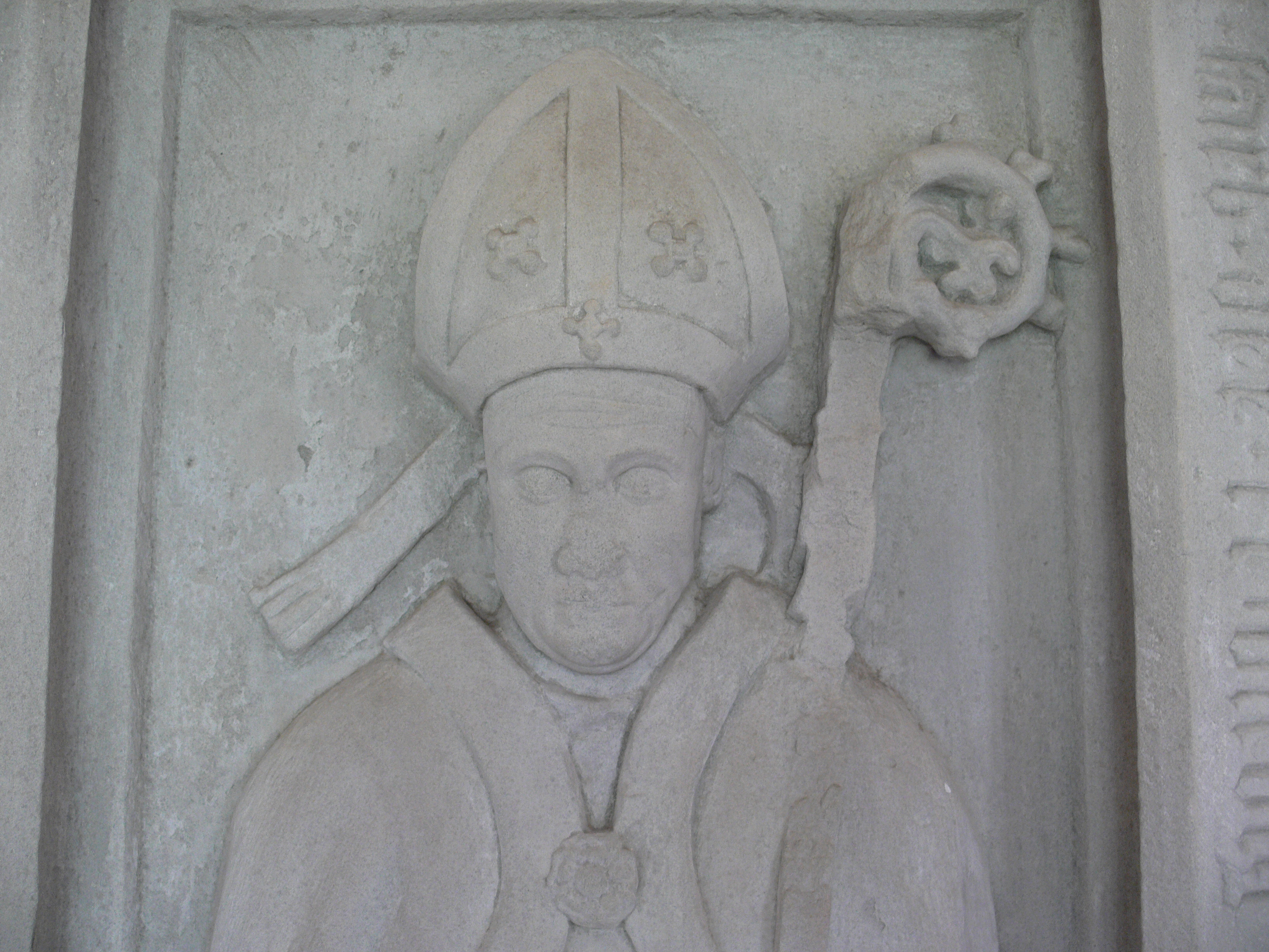 Kloster Blaubeuren, Kapitelsaal: Epitaph Anselm von Nenningen, Bischof von Augsburg, 1428, Detail